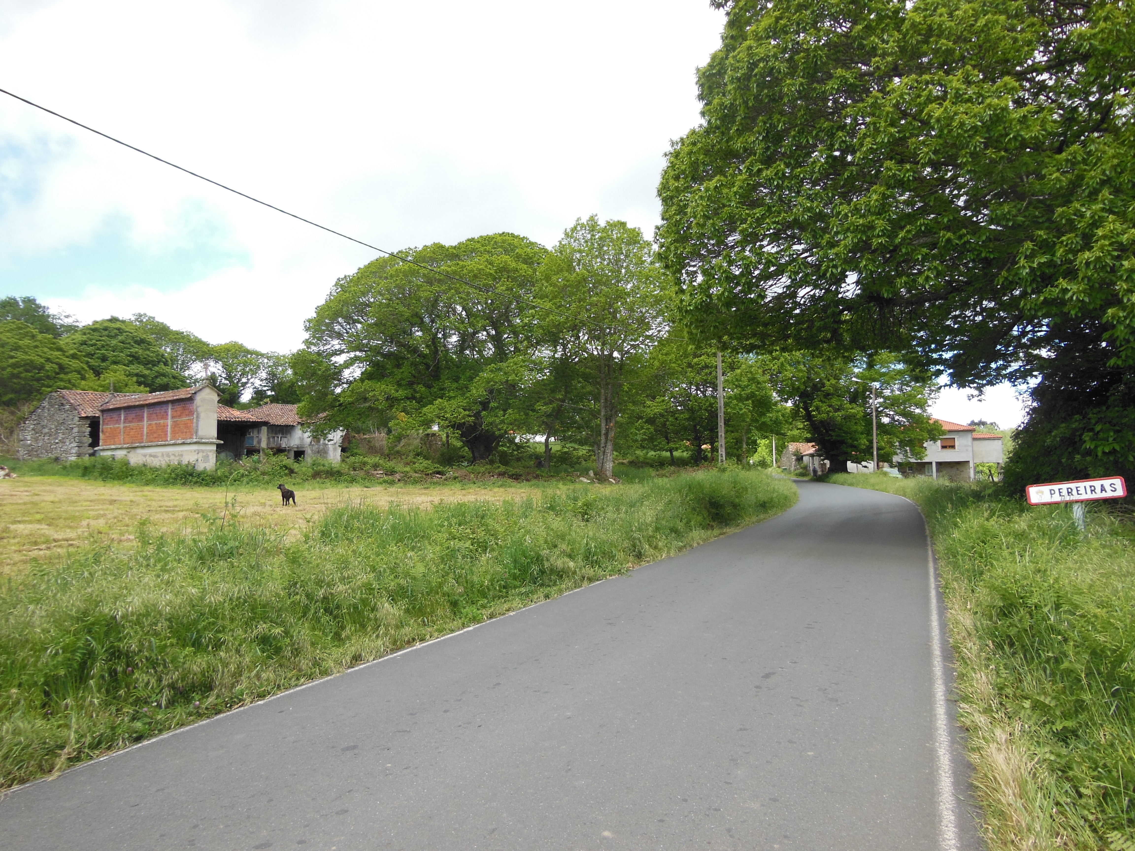 Vista de Pereiras (Amoexa, Antas de Ulla) desde a estrada LU-P-1809